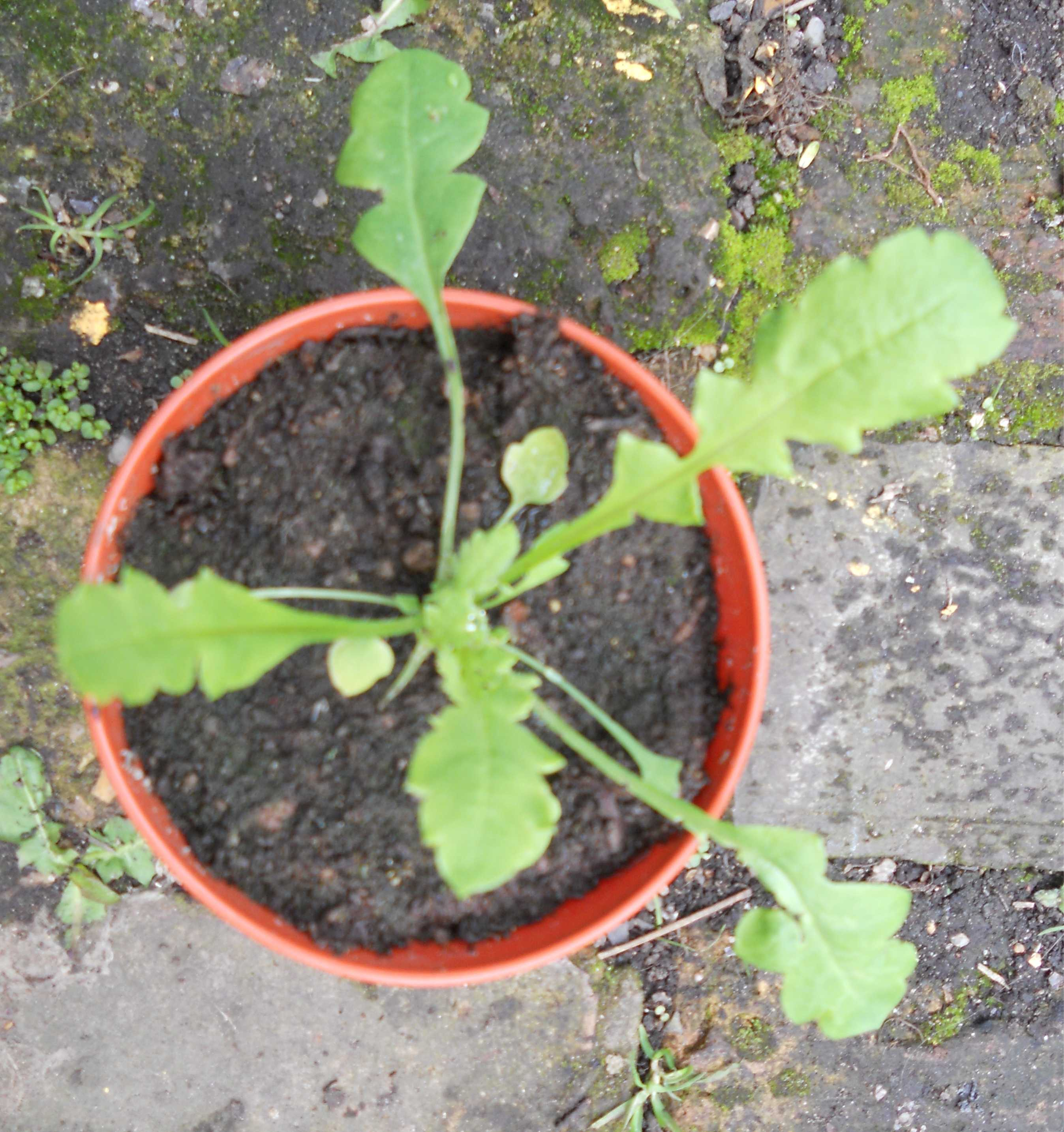 Papaver Paucifoliatum, junge Pflanze, Aussaat Frühjahr 2013